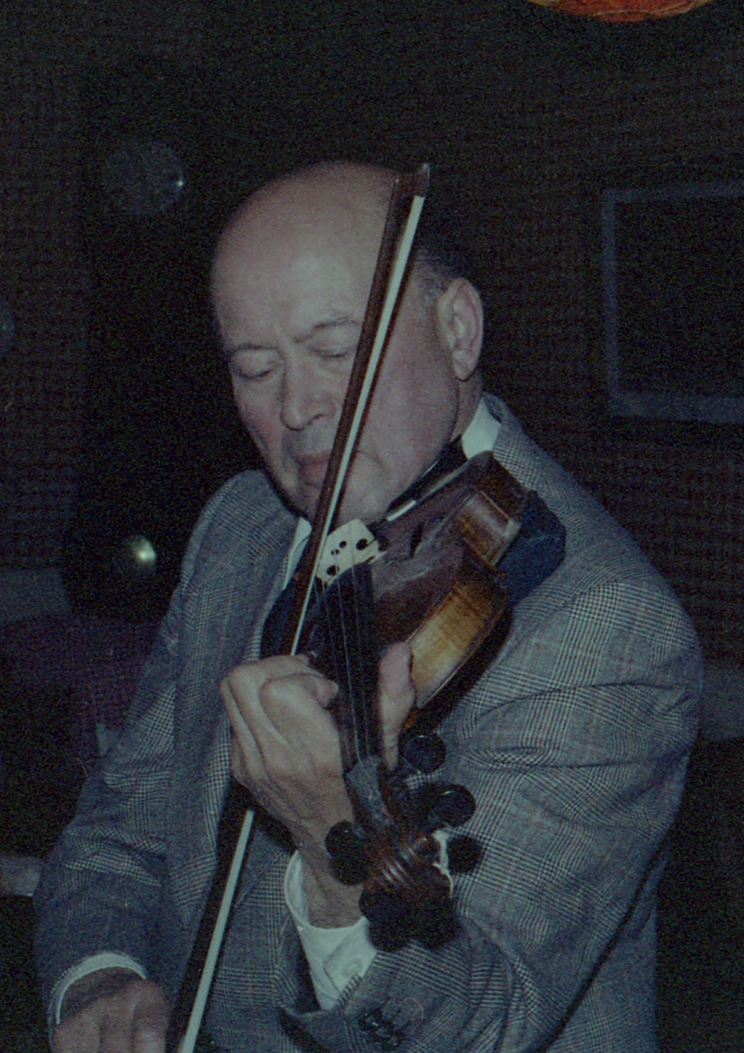 Joska Muszka en 1979